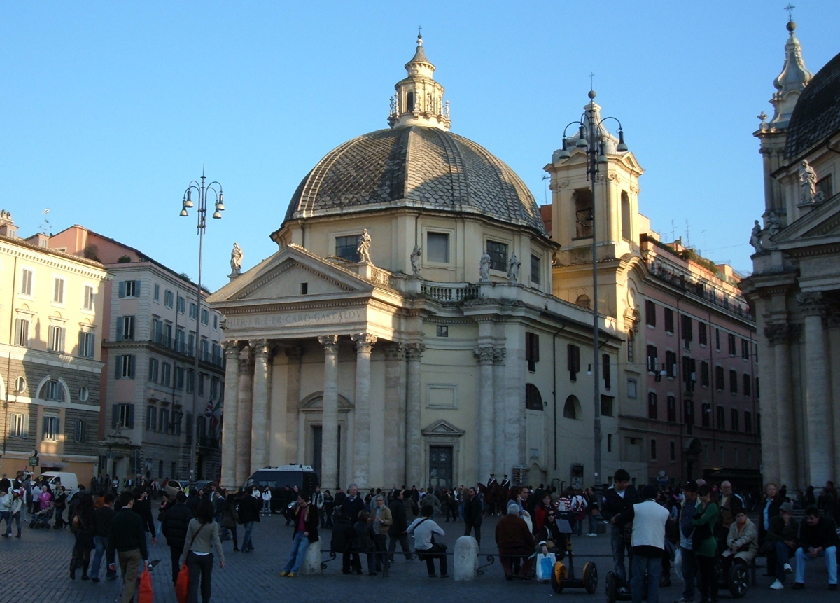 Chiesa di Santa Maria in Montesanto, a Roma, nel rione Campo Marzio. Foto personale.